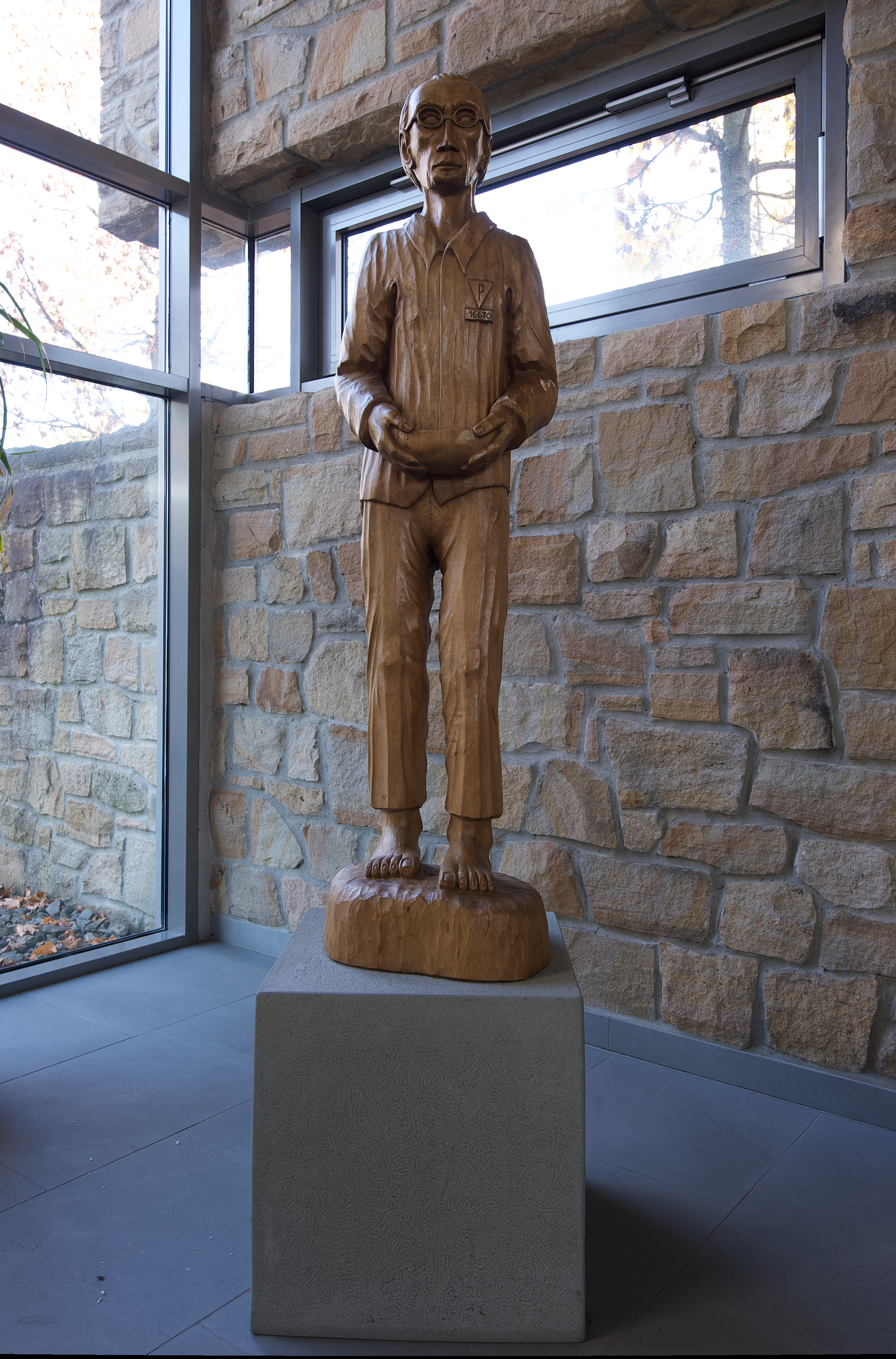 Statue Maximilian Kolbes in der ehemaligen Maximilian-Kolbe-Kirche in Bad Lippspringe bei Paderborn